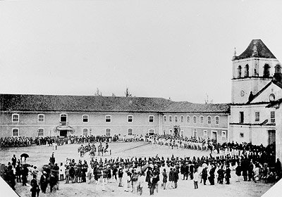 Igreja e Convento do Colégio, em fotografia de 1862 (atual Pátio do Colégio)